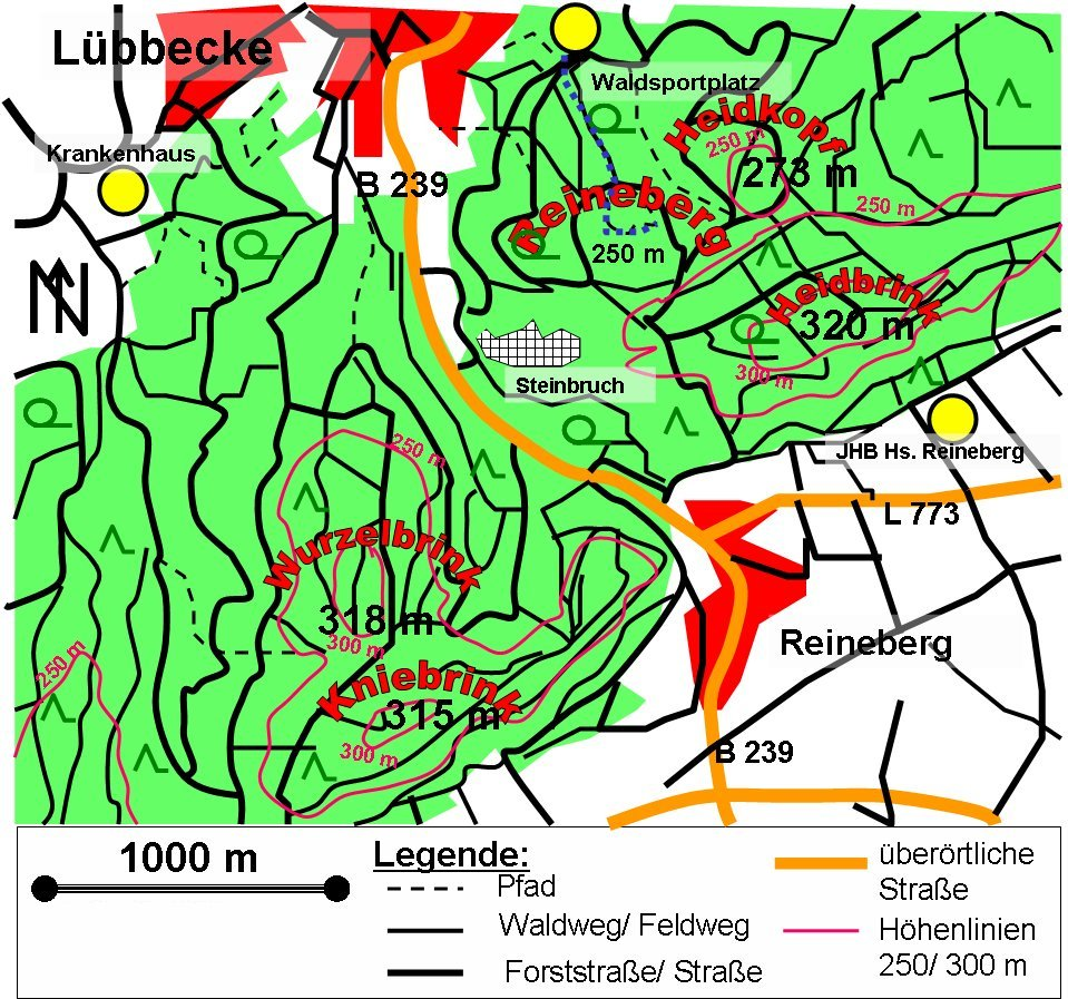 Karte Reineberg Sonstiges: freie Lizenz durch Zeichner wird erteilt